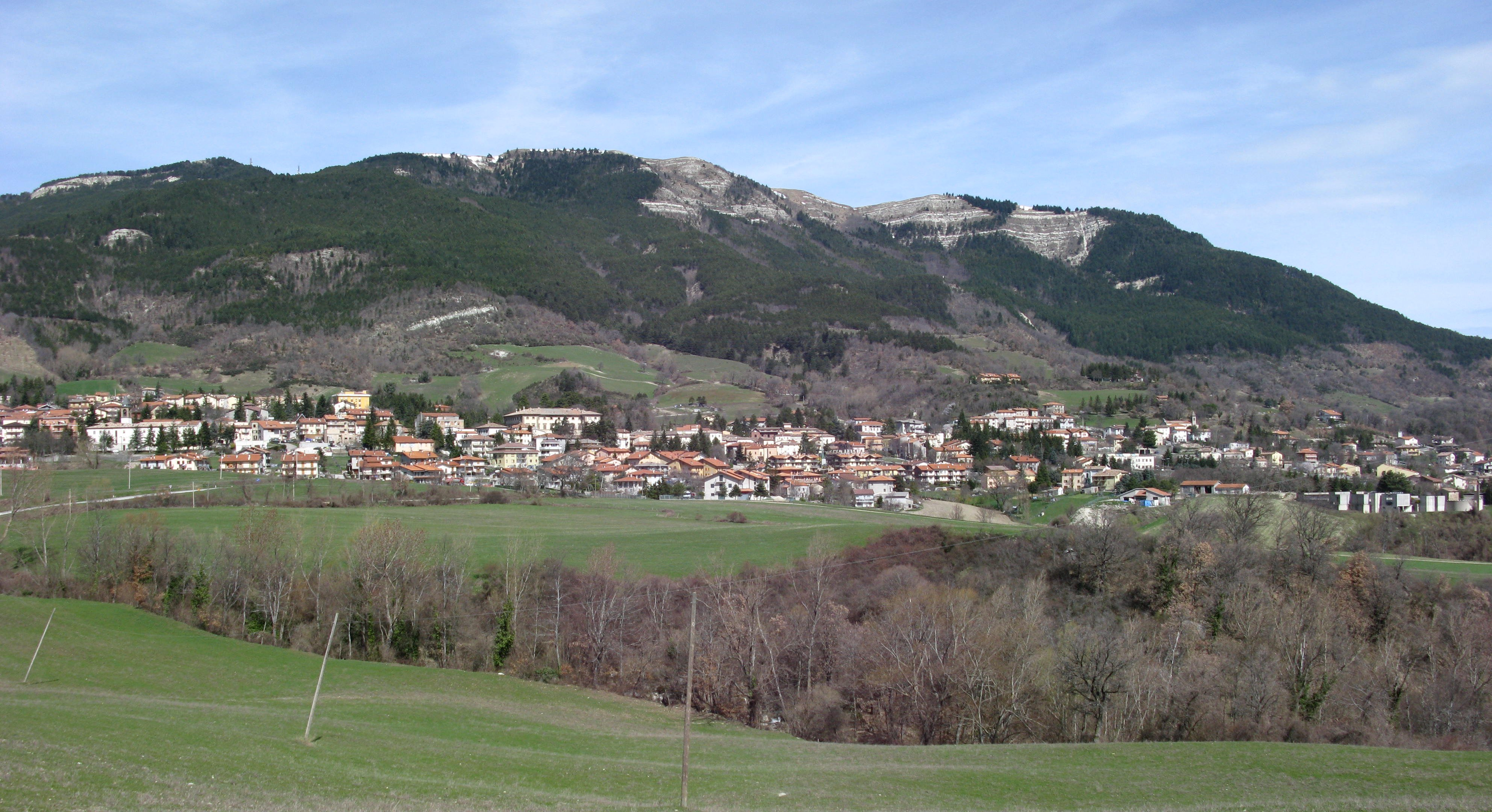 Panorama di Carpegna.